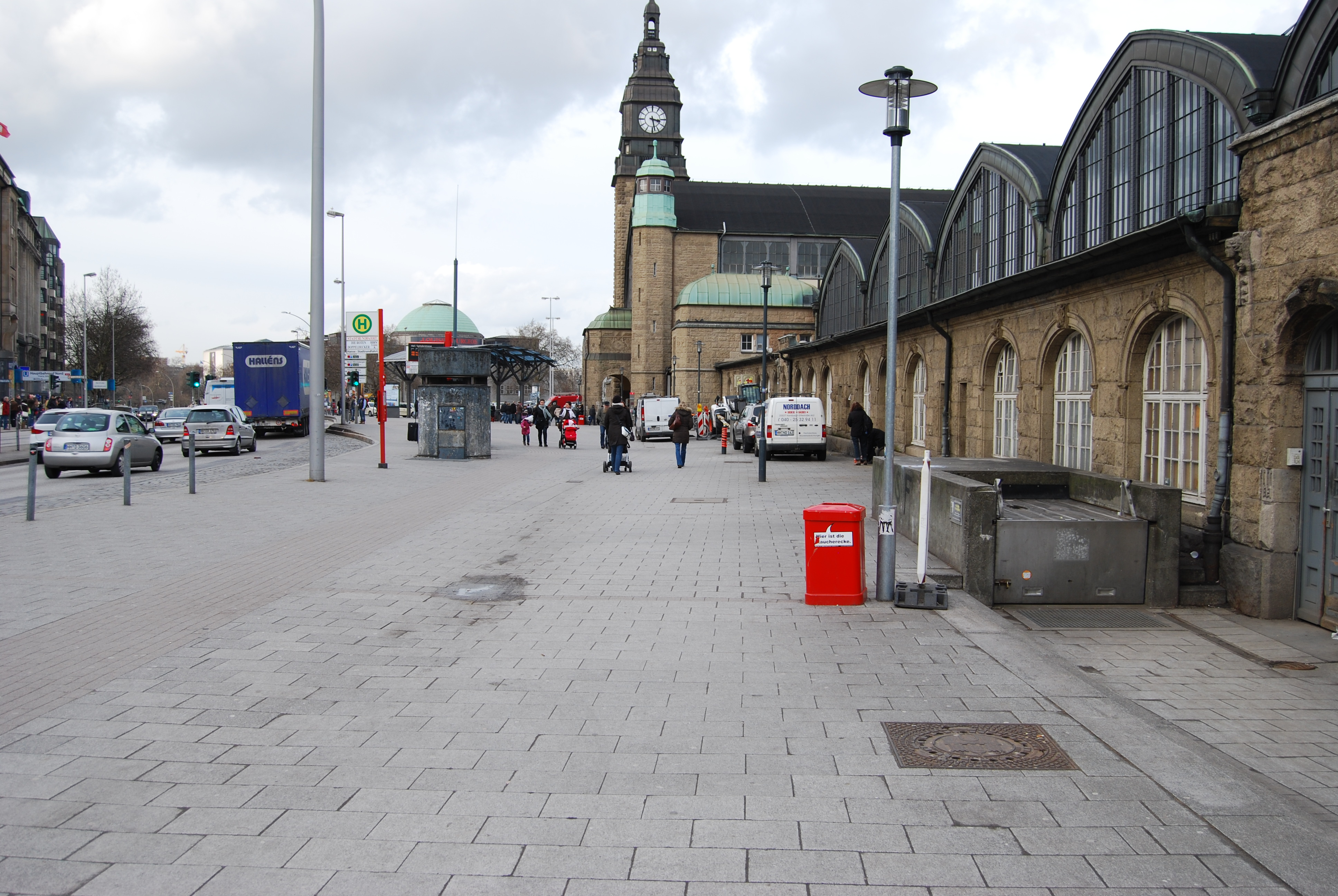 Auf diesem Bild sind Teile des Hamburger Hauptbahnhofes zu sehen, der Eingang zur Führung in den Tiefbunker Steintorwall, sowie das oberirdische Bunker-Bauwerk in dem sich Einsaugstutzen der Lüftungsanlage, Betankungsstutzen sowie Notauswurf der Abwasserleitungen befinden